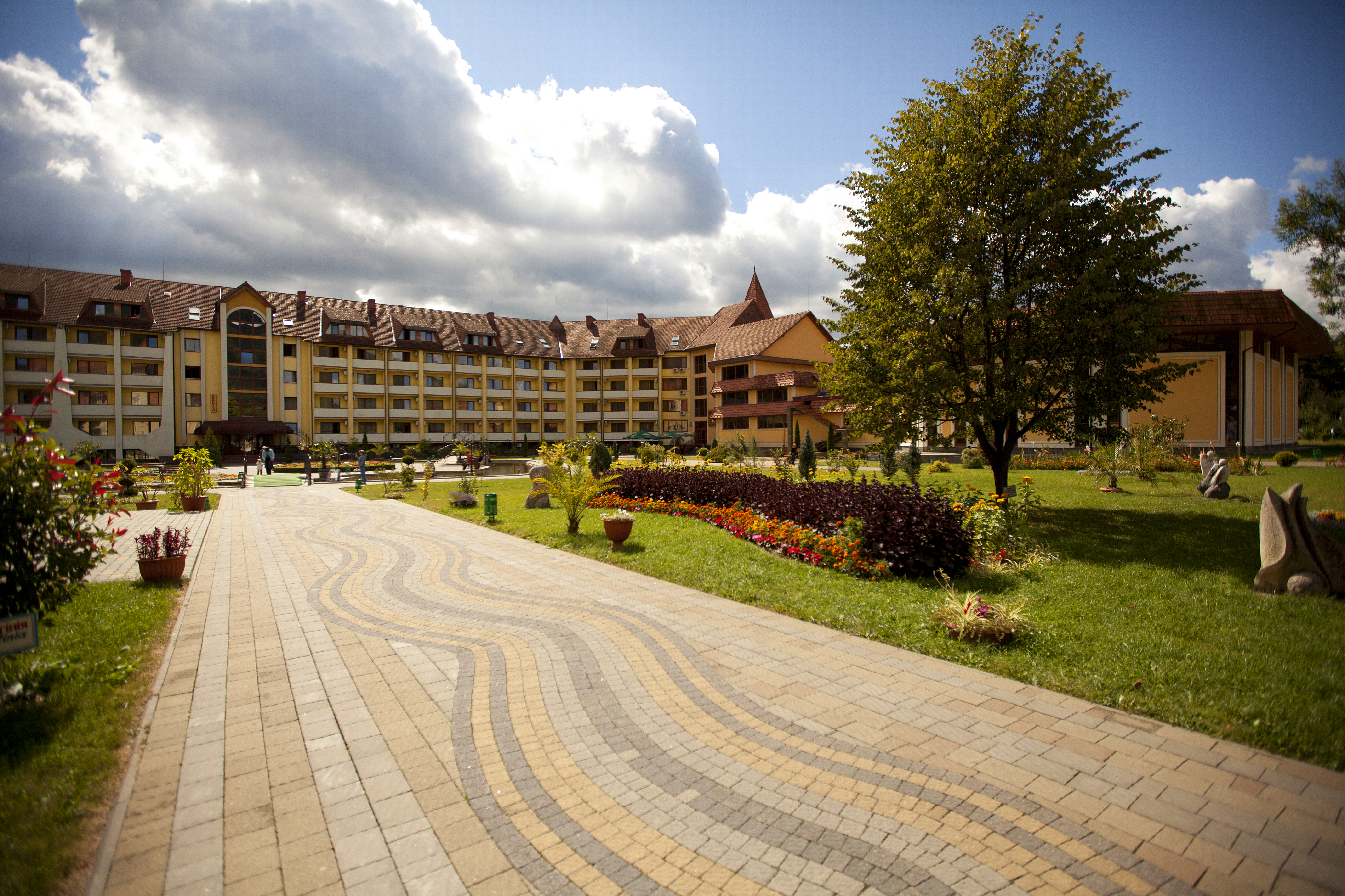 Санаторий Квитка Полонины, корпус Сузирья